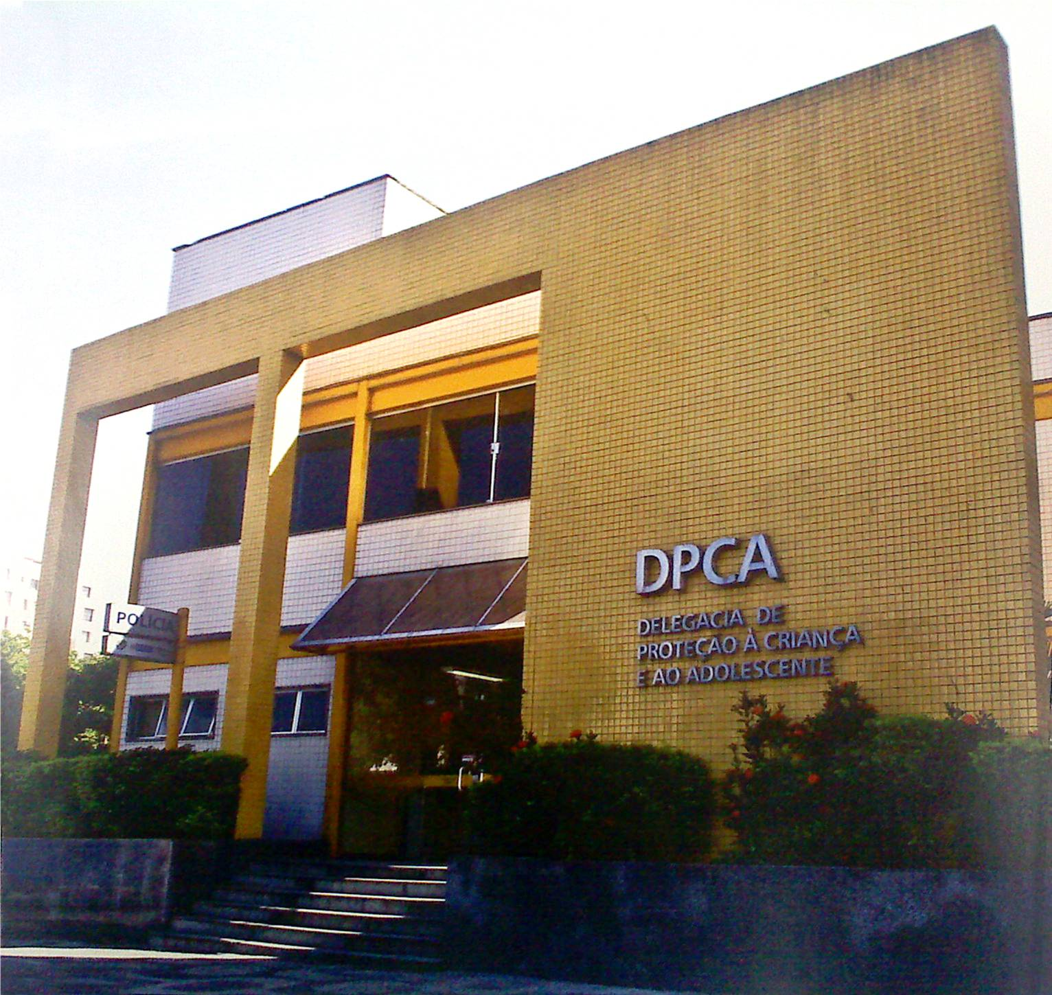 Fotografia feita por mim de uma Delegacia Legal do Rio de Janeiro, situada na Avenida Presidente Vargas.